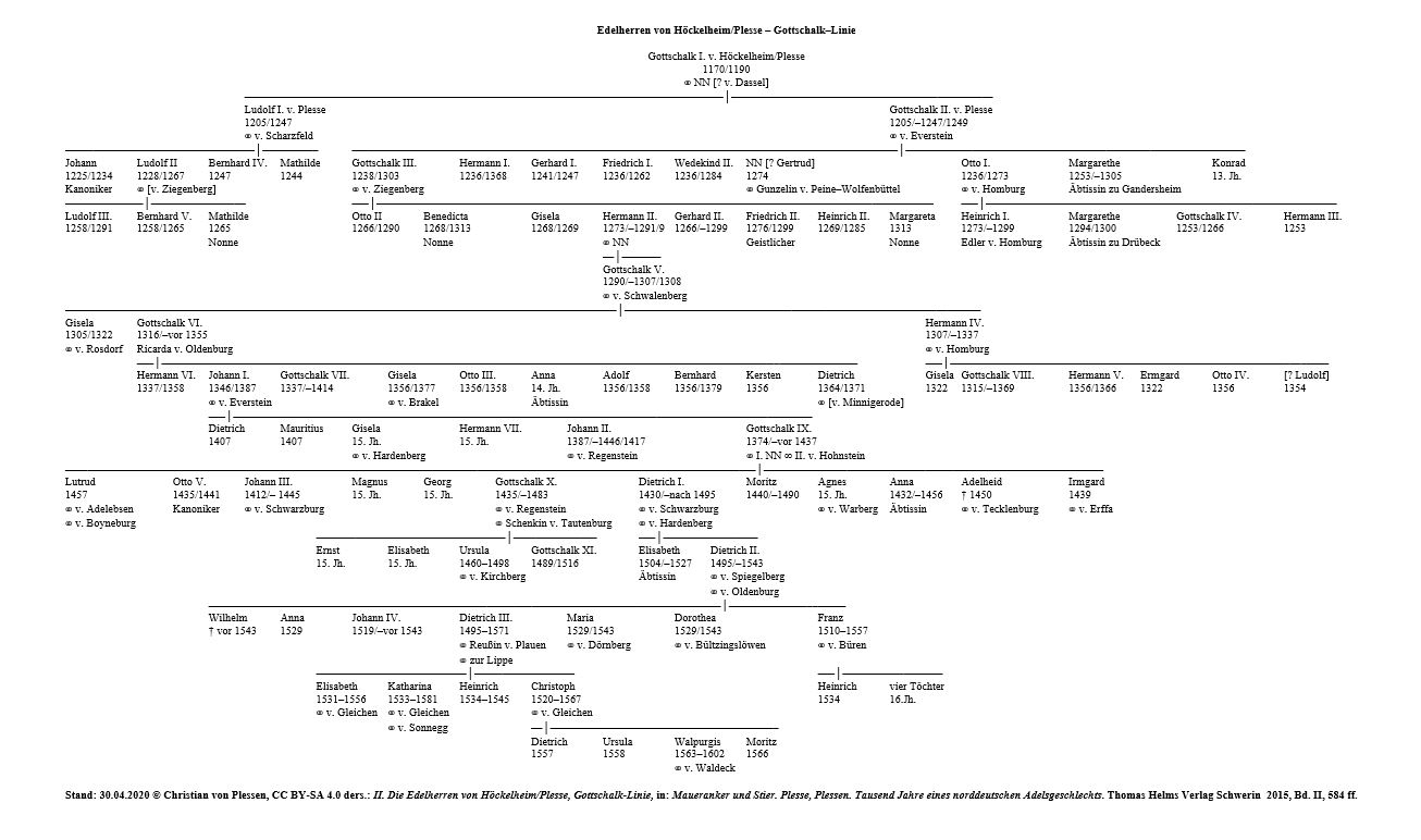 Stammtafel